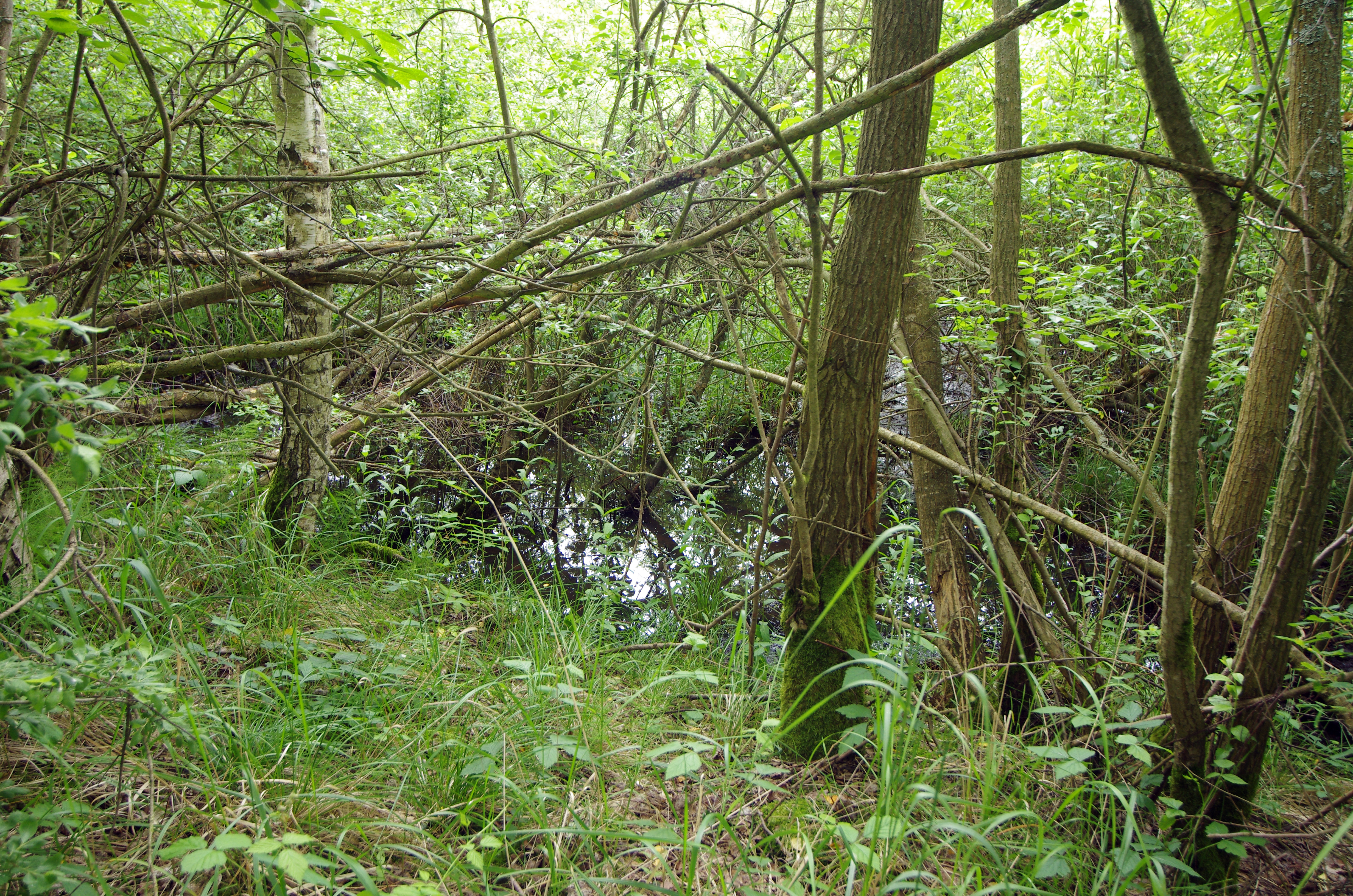 Přírodní rezervace Rathsam, okres Cheb